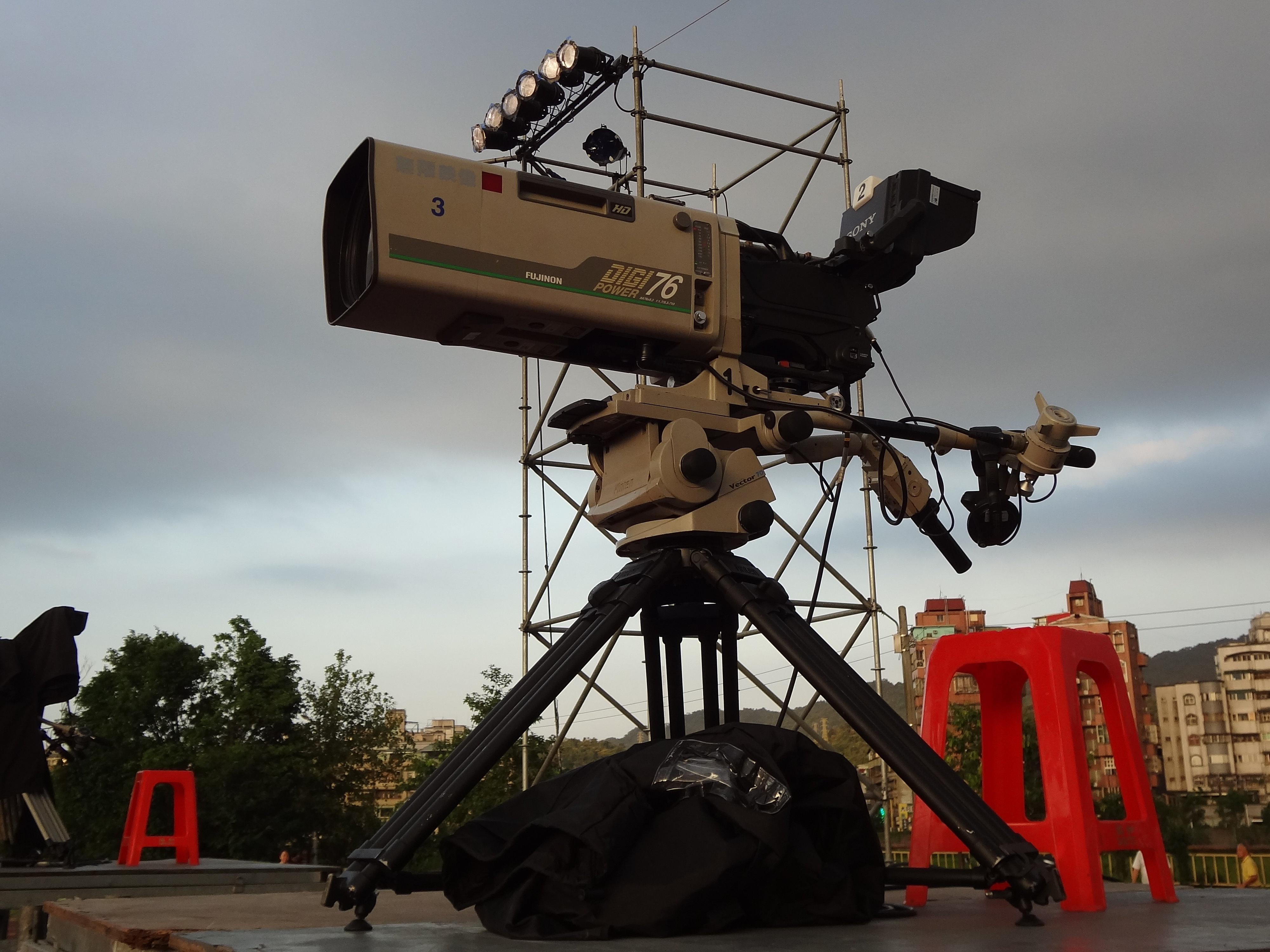 三立台灣台綜藝節目《超級夜總會》於基隆市七堵區堵南國民小學操場錄影，無限映像Sony電視攝影機設於觀眾席後方。